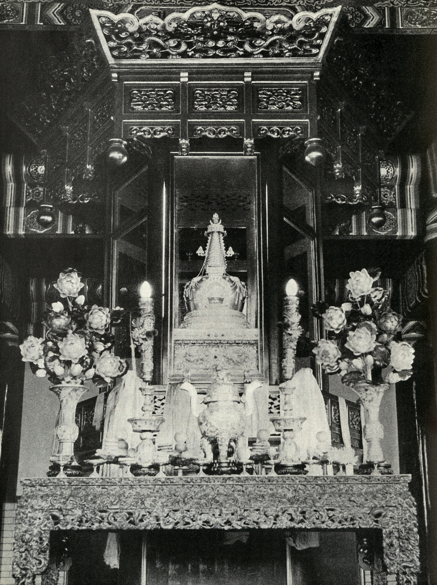 Reliquiar der Zahnreliquie des Buddha im pekinger Guǎngjì sì.